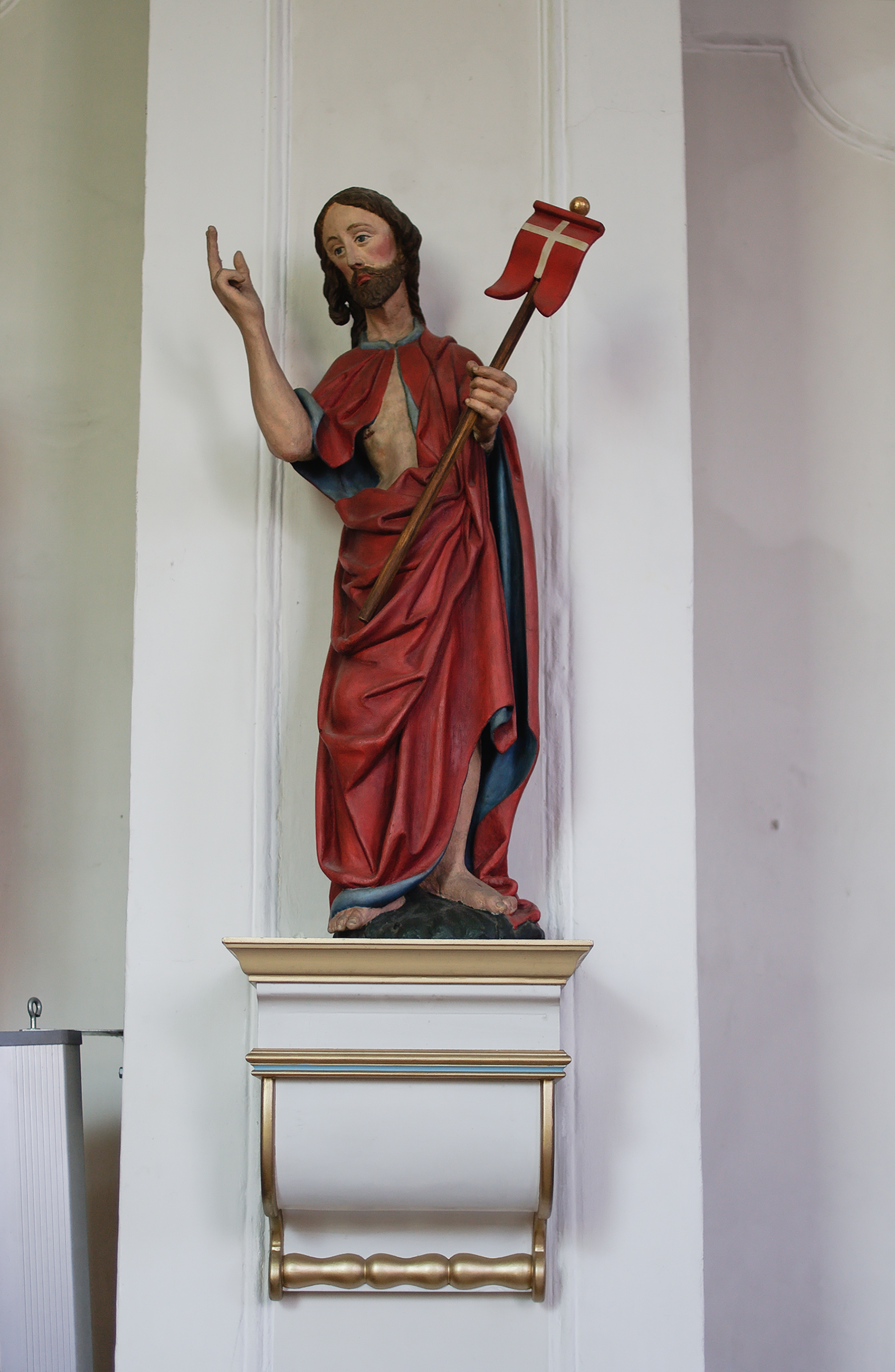 Gotische Figur des auferstandenen Christus von um 1500 in der Pfarrkirche St. Stephan in Leonstein (Gemeinde Grünburg)